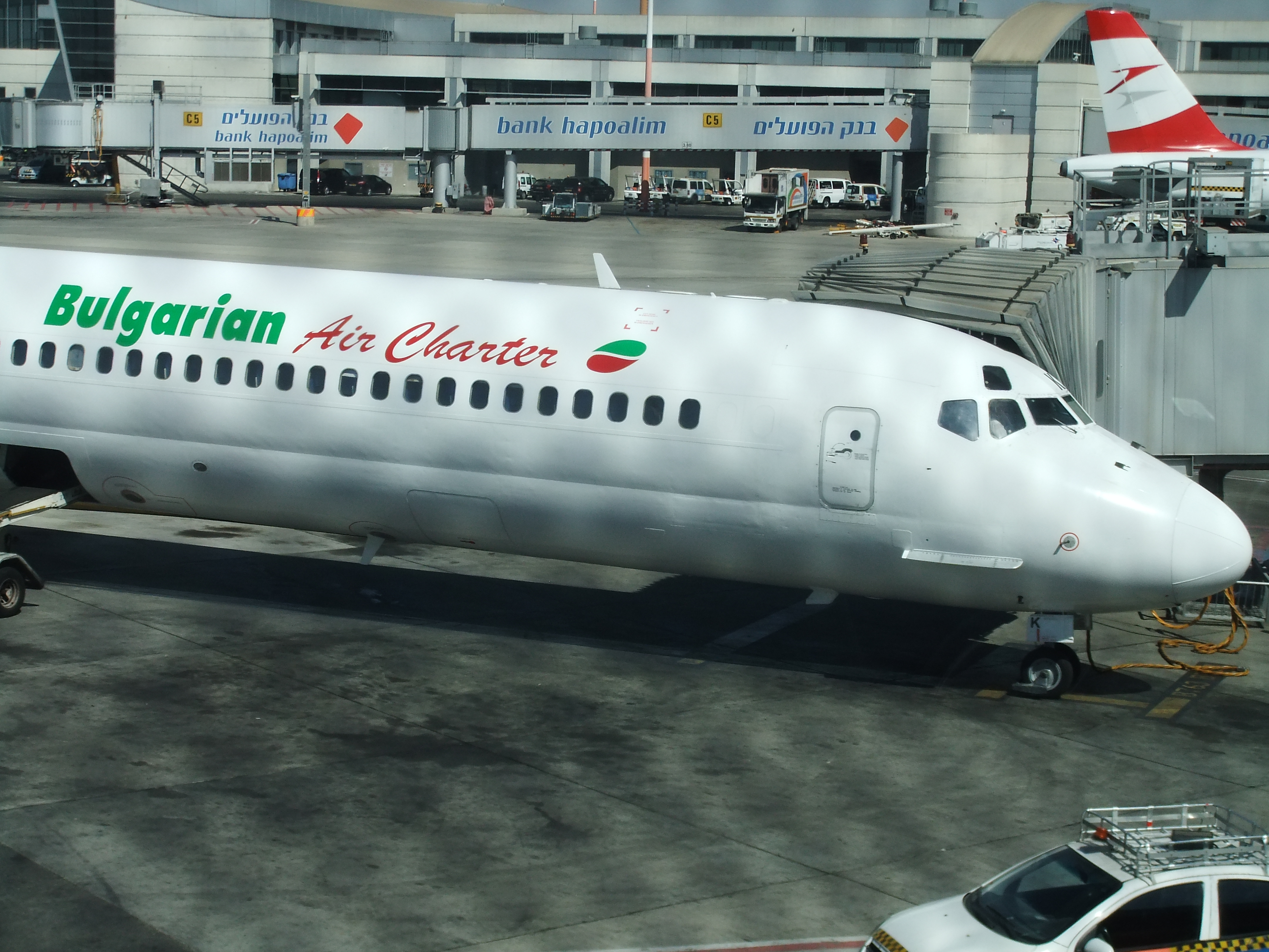 מטוס של בולגריאן